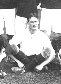 Just Göbel voor aanvang van de wedstrijd Nederland - België (4-2) op 26 april in Amsterdam.